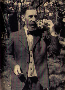 Emil Pavel Lány (1879 - 1945), Český šlechtic a právník.